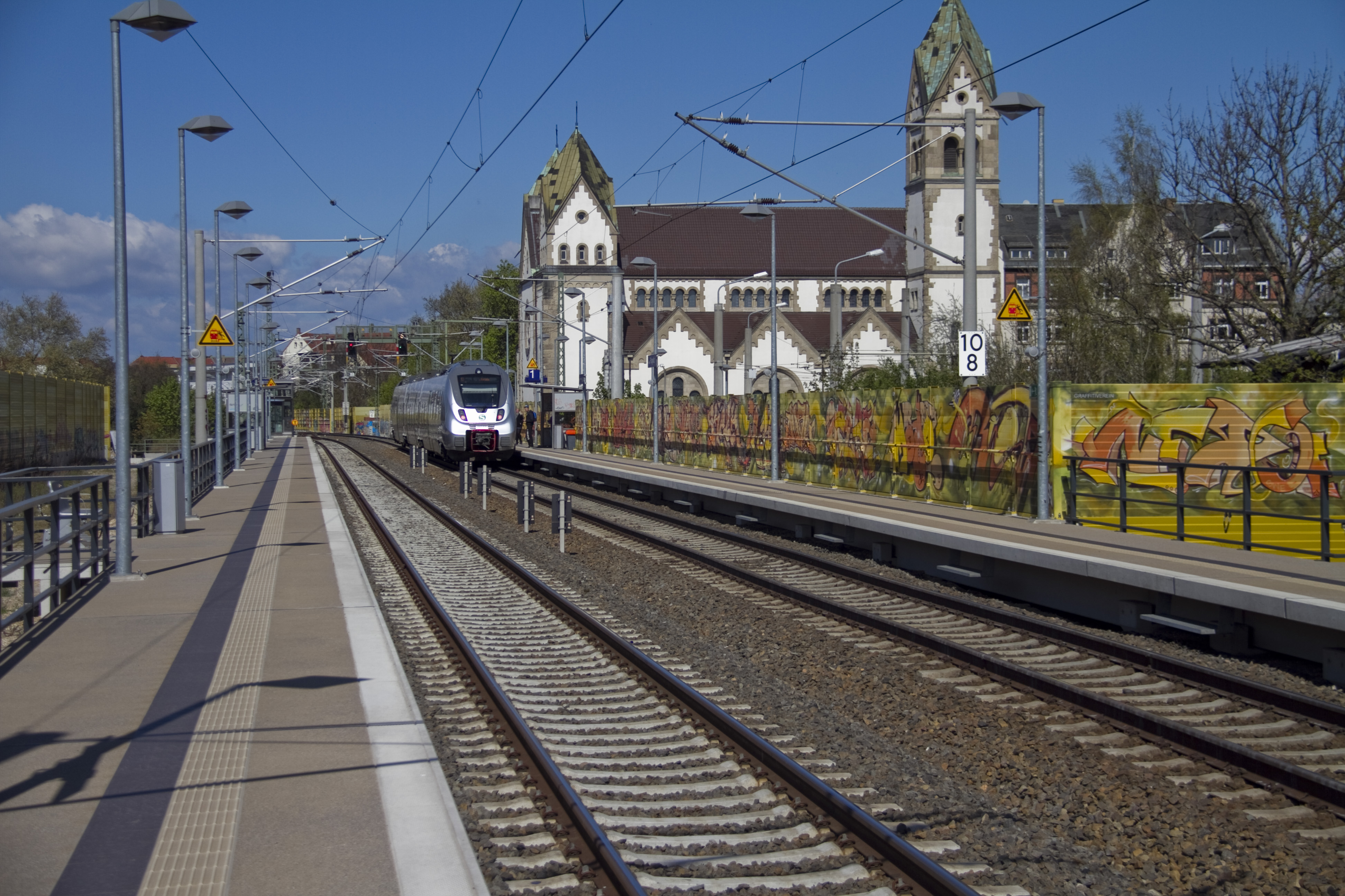 Bahnsteig nach dem Umbau